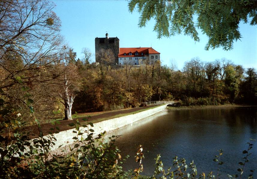 Schloss Ballenstedt Autor: Hejkal @